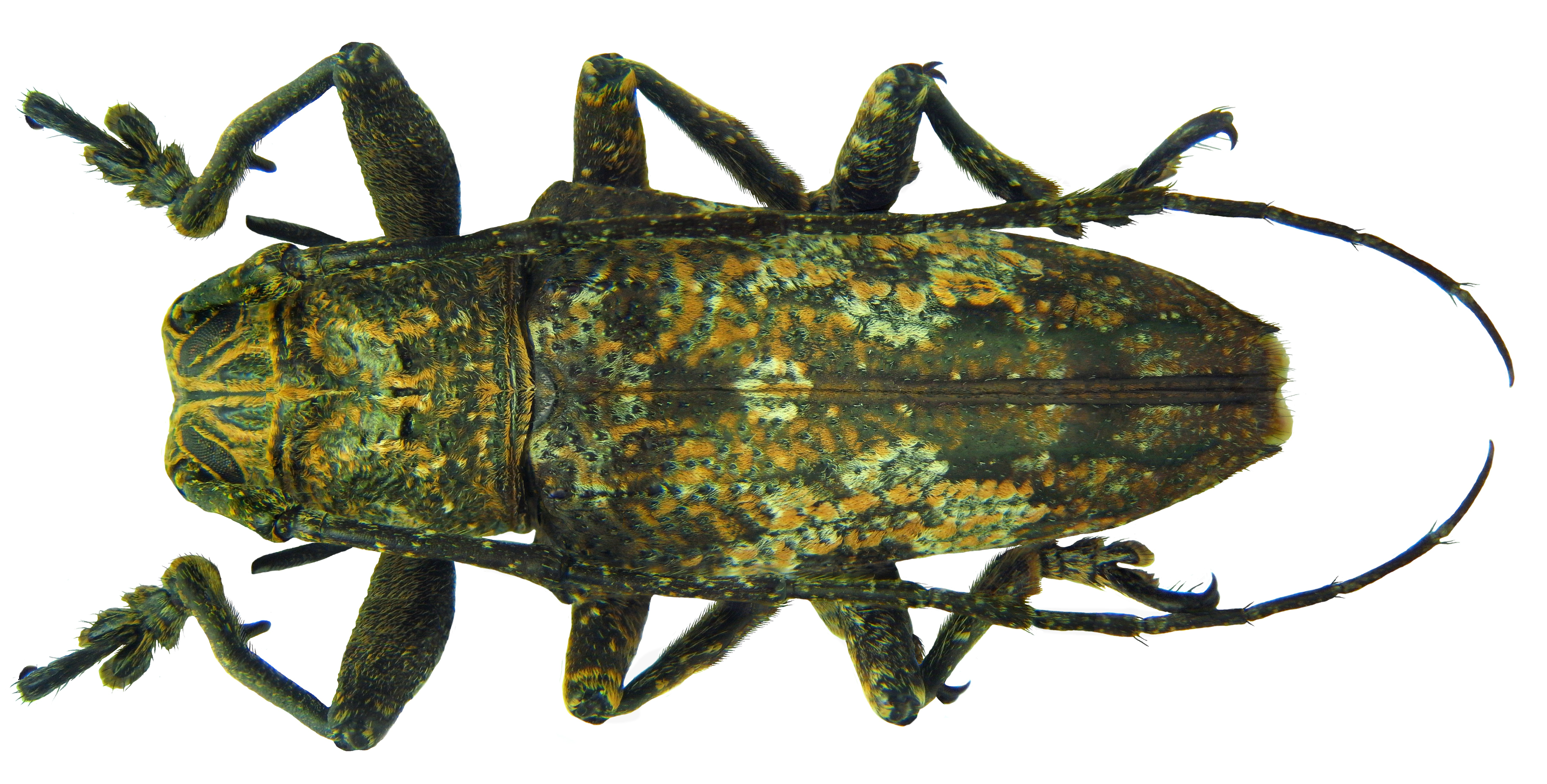 Familie: Cerambycidae Groesse: 22,5 mm Fundort: Indonesien, Aru Islands, Wamar-Isl., Dobo leg. A.Skale, 2011; det. A.Weigel, 2011 Photo: U.Schmidt, 2011